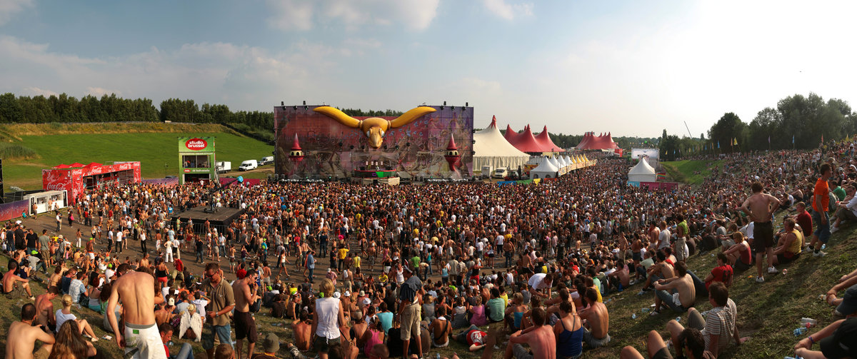 Português do Brasil: Tomorrowland palco principal 2008